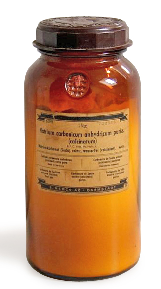 Calcinierte Soda